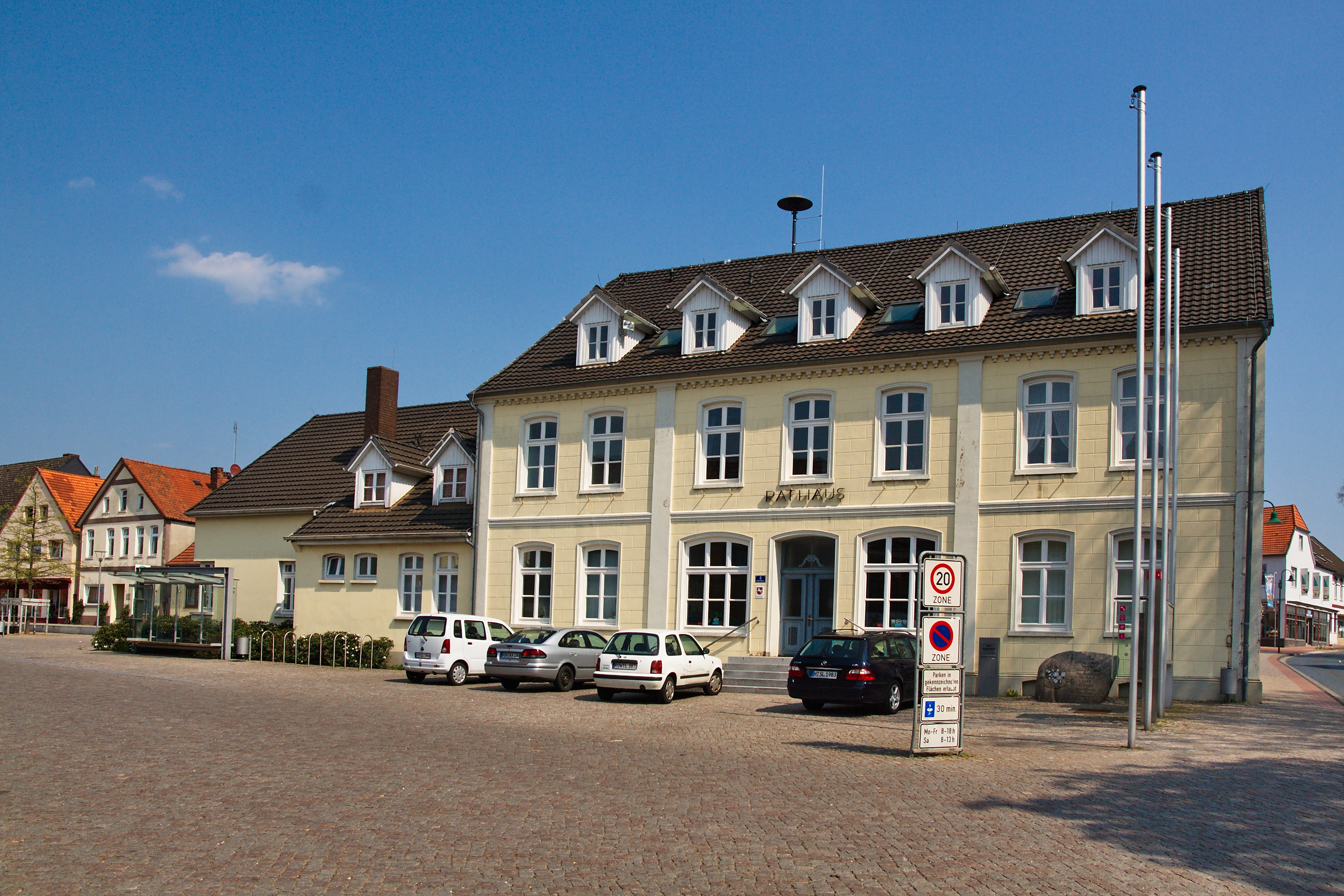 Rathaus in Visselhövede, Niedersachsen, Deutschland